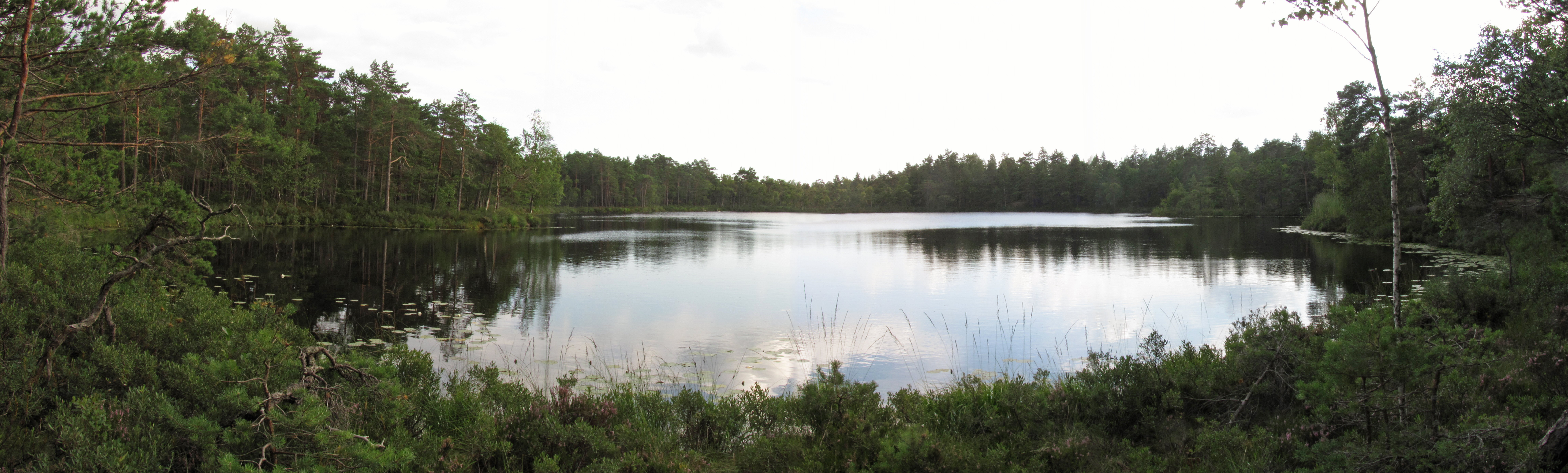 Svartsjön, Hanveden